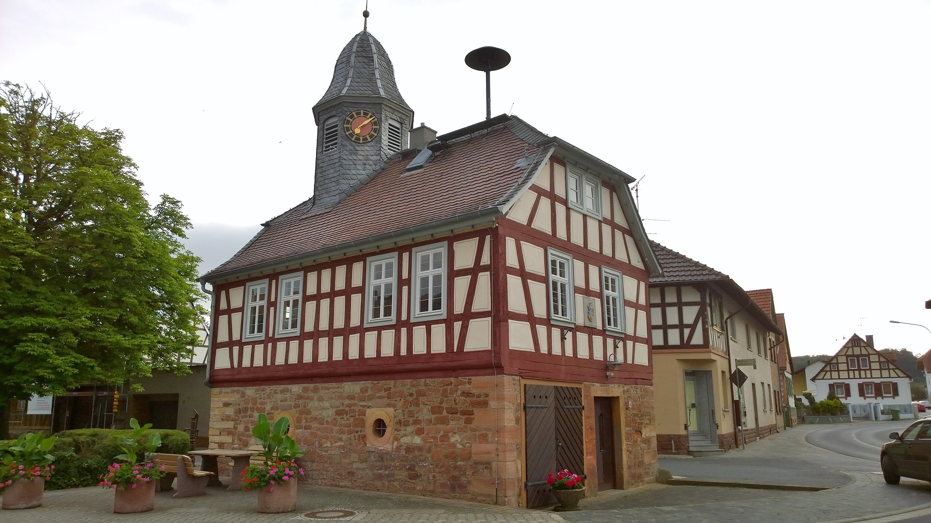 Das Rathaus des Schaafheimer Ortsteiles Schlierbach, zur Hauptstraße weisend die Wappendarstellung